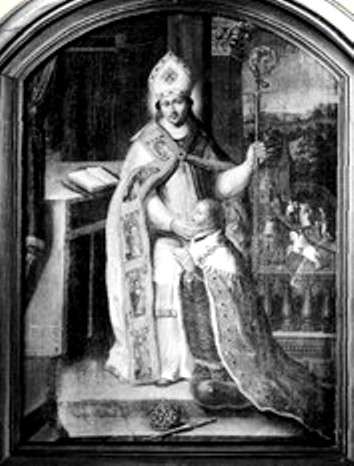 Saint Marculphe rend le pouvoir thaumaturgique au nouveau roi de France; peinture dans l'église Saint-Georges, Grez-Doiceau